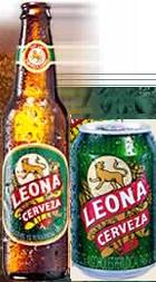 Producto "Cerveza"